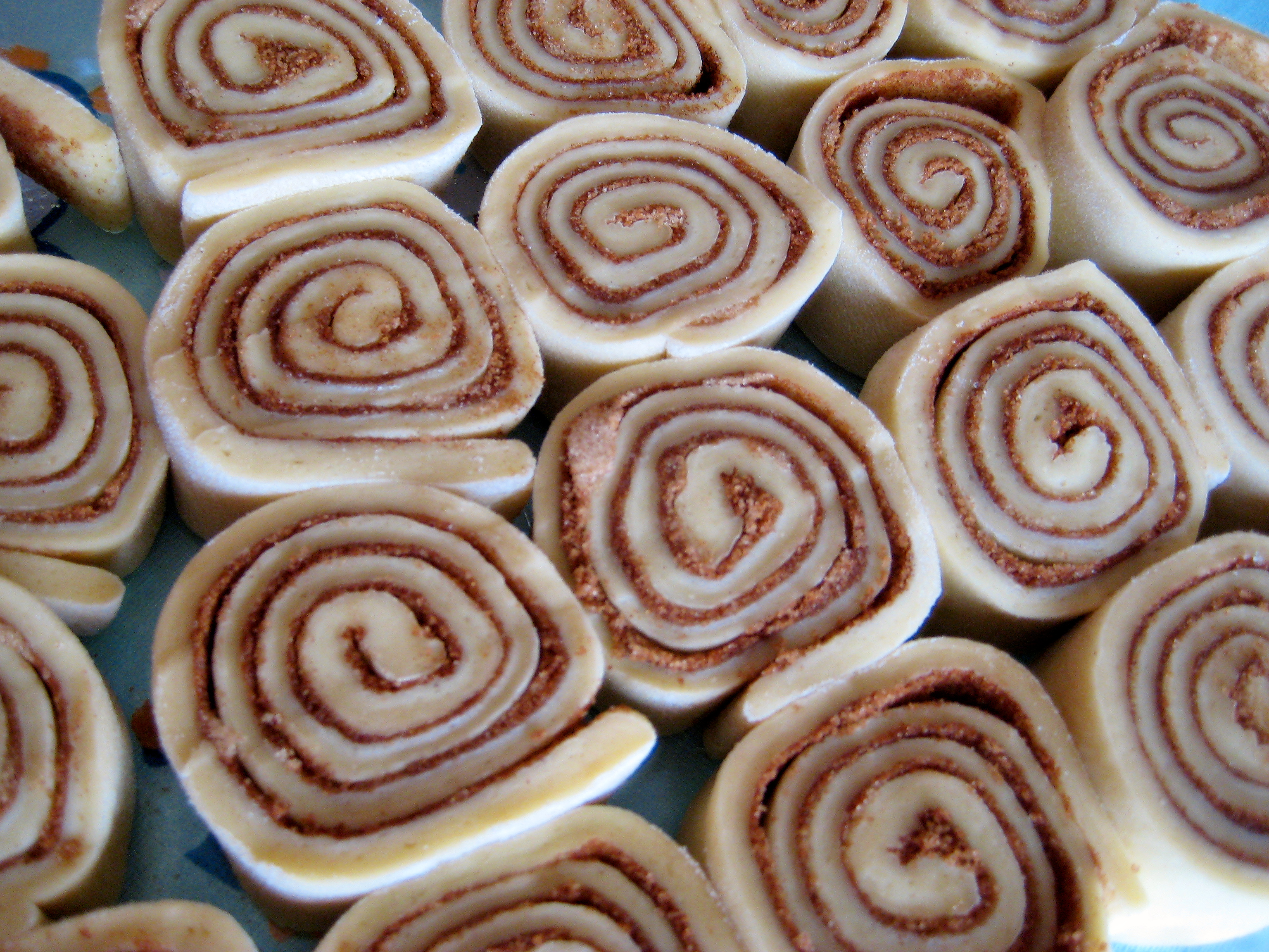 Cinnabon clone.